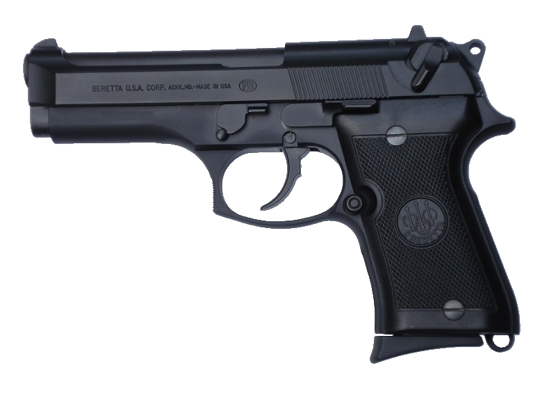 Beretta-92FS Compact Type M (Левая сторона)